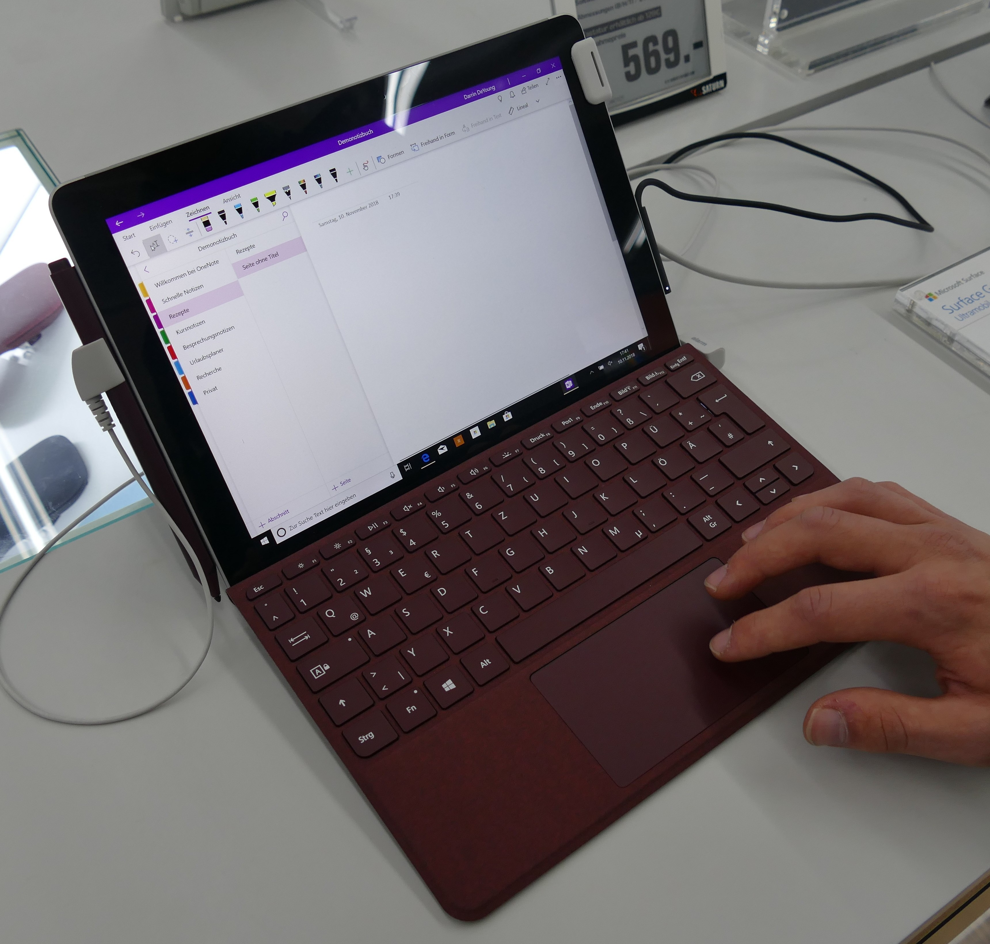 Das Microsoft Surface Go mit angeschlossenem TypeCover und Surface Pen in einem Elektronikfachmarkt.